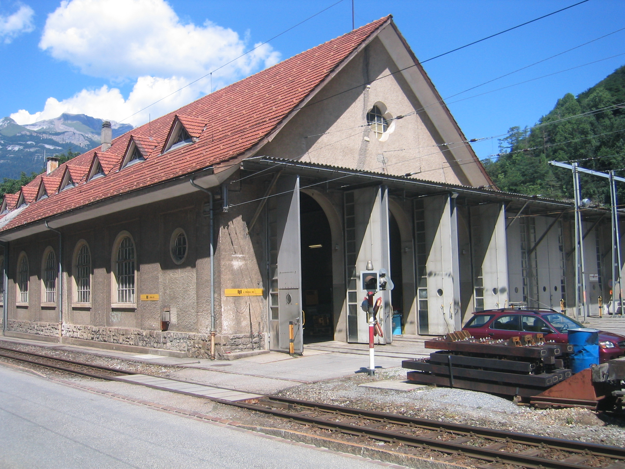 ex Depot der Arosabahn im Sand in Chur